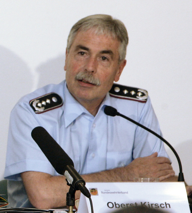 Das Parlament der Wehrpflichtigen tagt in Berlin. Dabei spricht der Bundesminister der Verteidigung Karl-Theodor zu Guttenberg zu und mit den Soldaten. Rechts neben ihm sitzt der Vorsitzende des Bundeswehrverbandes, Oberst Ulrich Kirsch. ©Bundeswehr/Bienert.